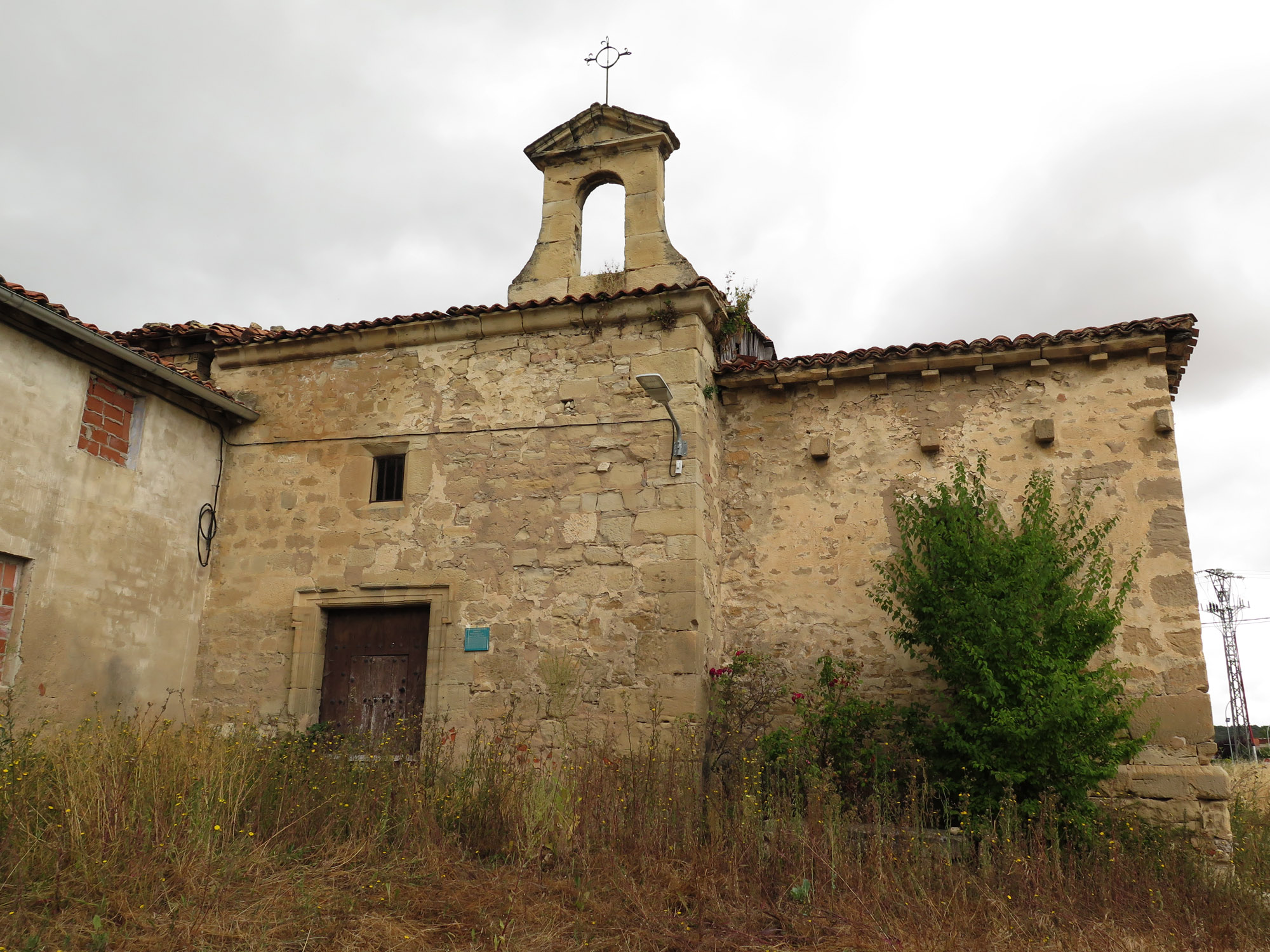 Iglesia del pueblo de Arce (Miranda de Ebro, España)